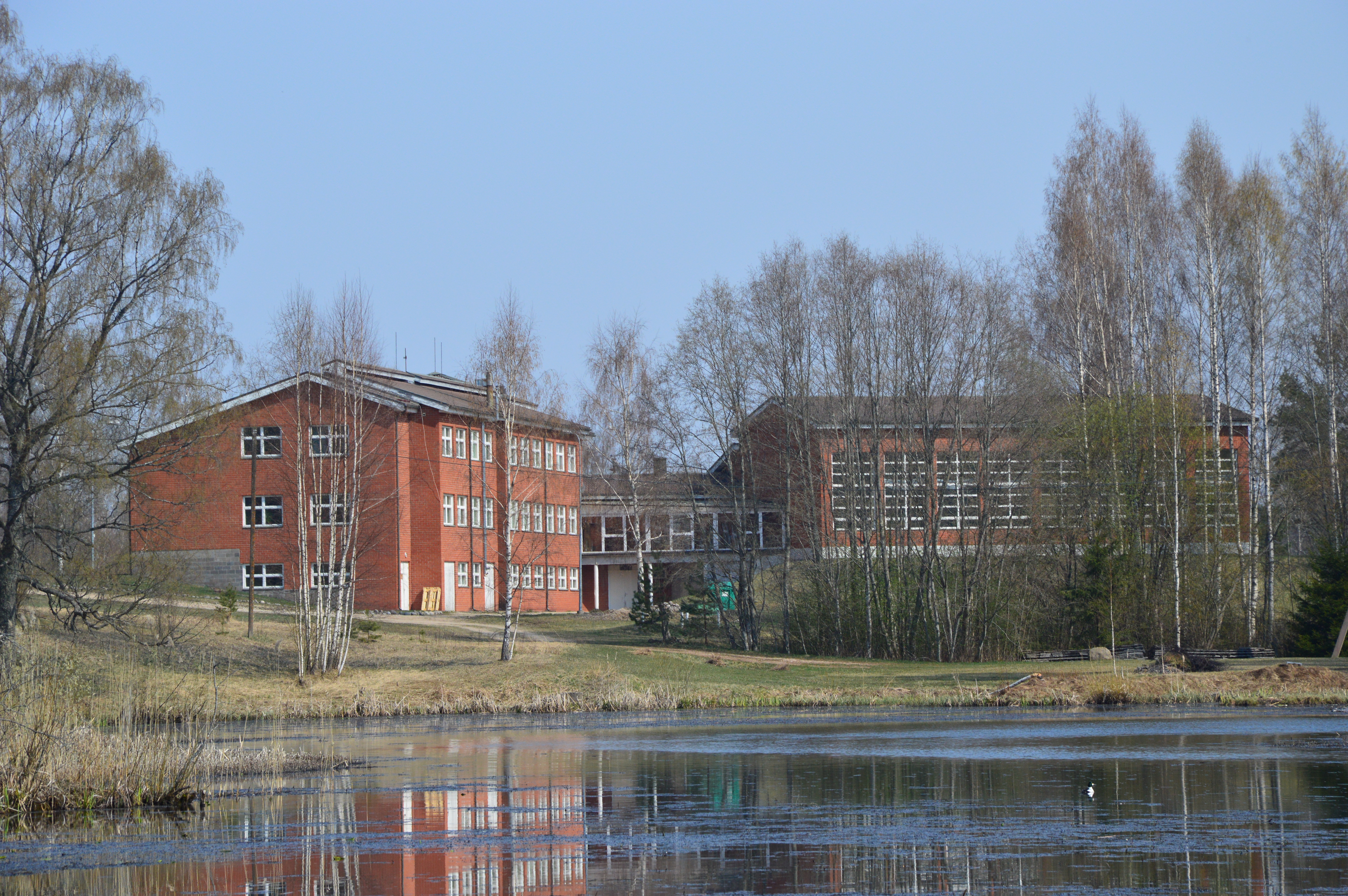 Krabi kool vaadatuna teiselt poolt Veskijärve.